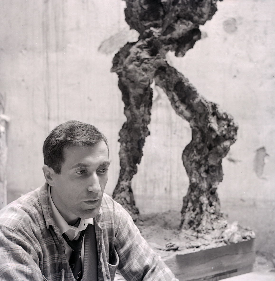 Servizio fotografico : Italia, 1965 / Paolo Monti. - Buste: 4, Fototipi: 4 : Negativo b/n, gelatina bromuro d'argento/ pellicola ; 6x6. - ((Serie costituita da 4 negativi identificati con i nn.: R14236-14239. Sulla busta del negativo R14236 manoscritto: "Alik Cavaliere". La suddetta serie è contenuta nella scatola identificata con la numerazione R14207/R14356. Sul coperchio della scatola, manoscritto a pennarello: "Ritratti".